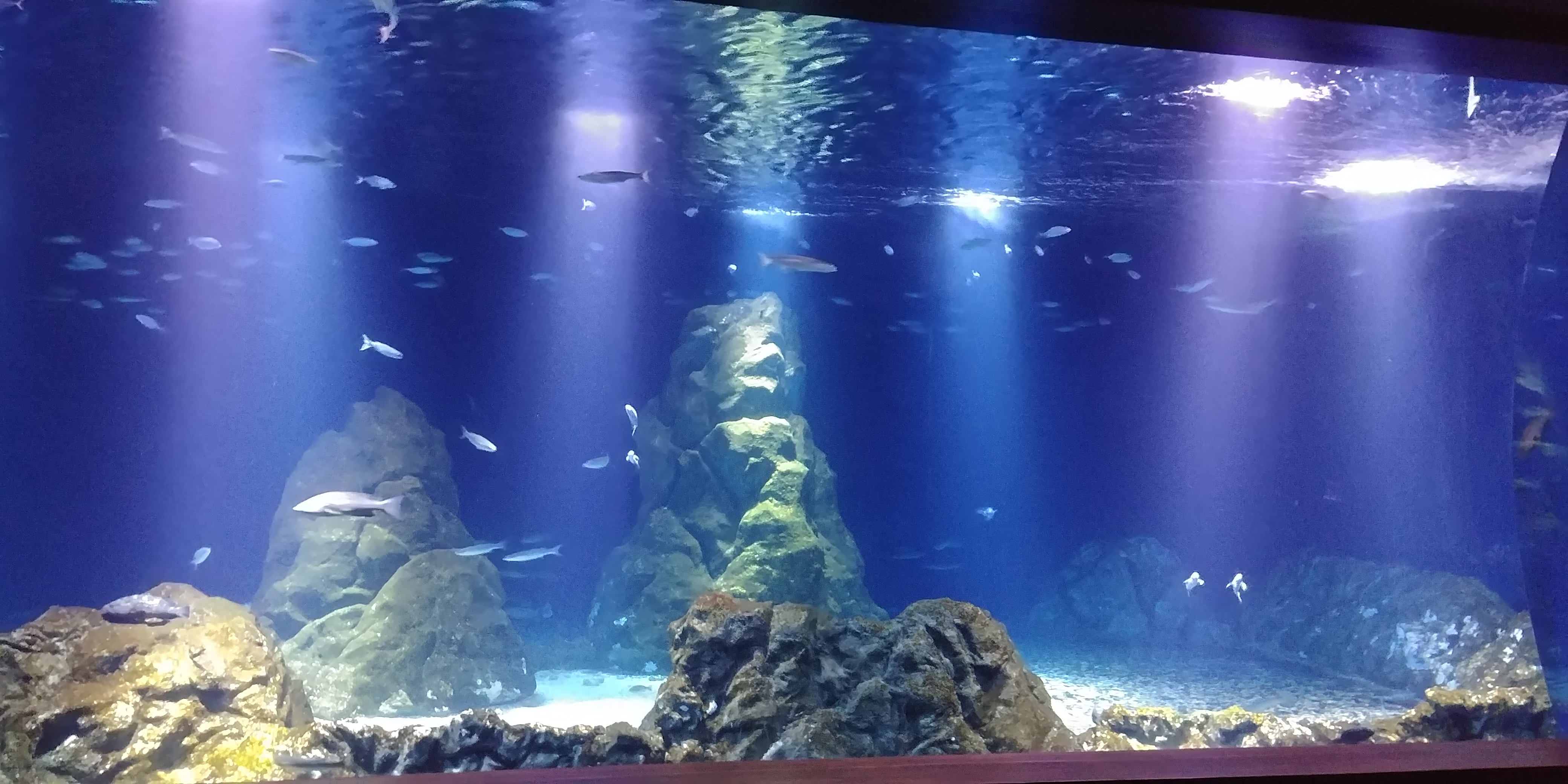 האקווריום המרכזי באקווריום ישראל